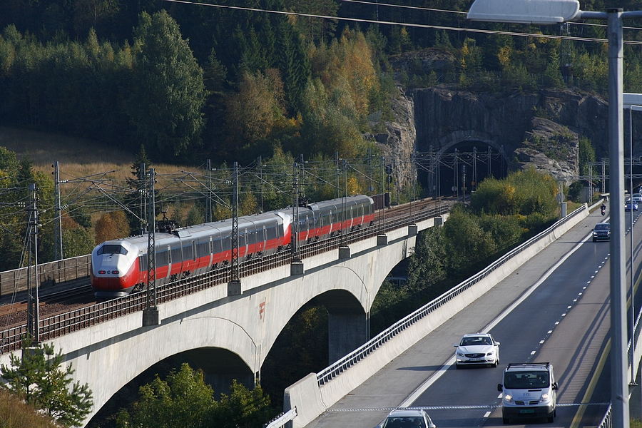 Bruer for jernbane og E6 over Hølendalen